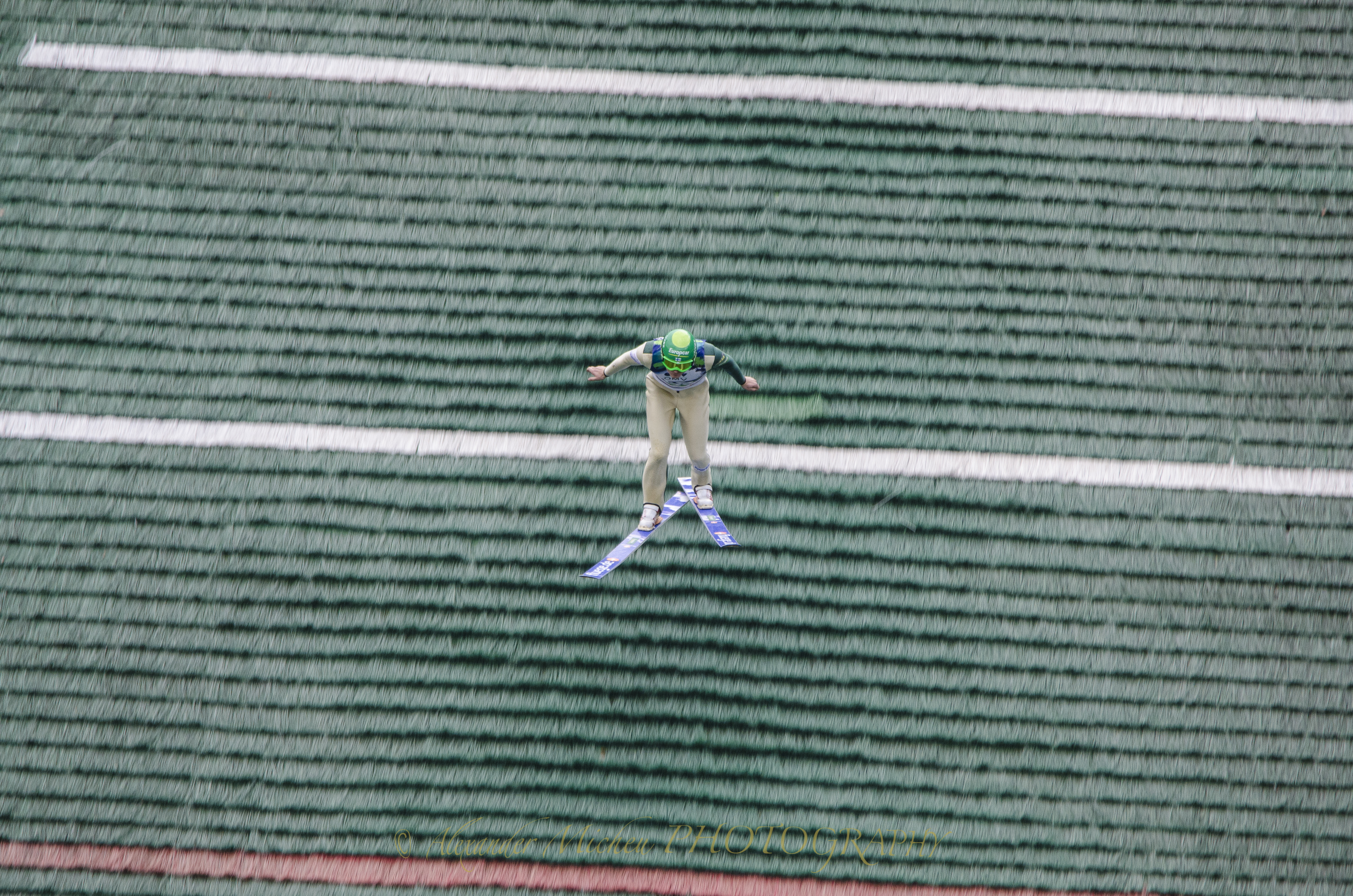 FIS Sommer Grand Prix Nordische Kombination 27. / 28. August 2013 Villach Möltschach